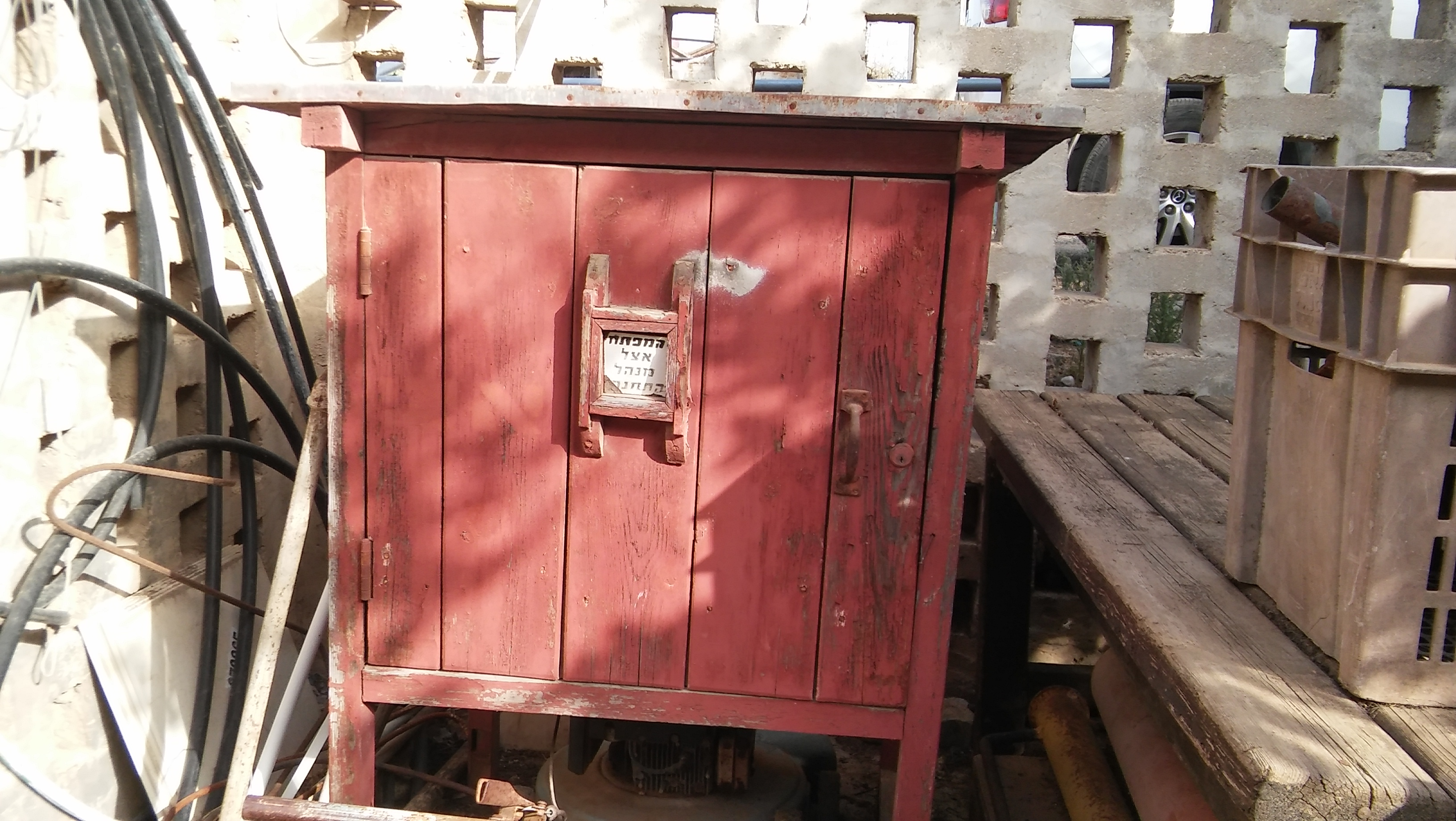 תחנת הרכבת הישנה של פתח תקווה - קופסת כיבוי אש